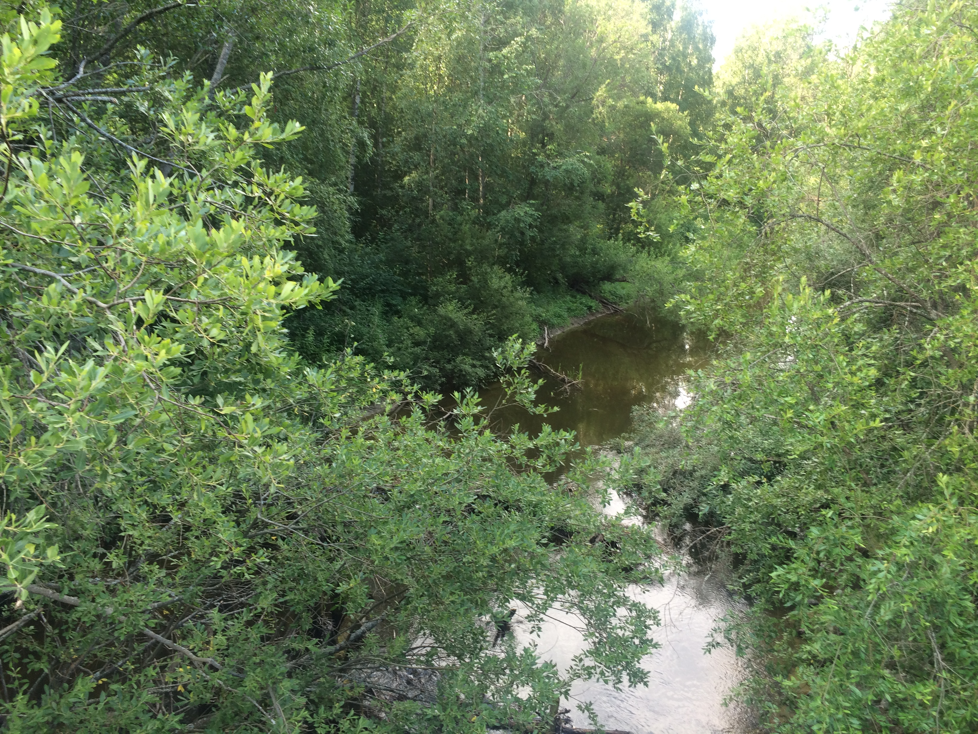 Нива (река, впадает в Сундозеро)